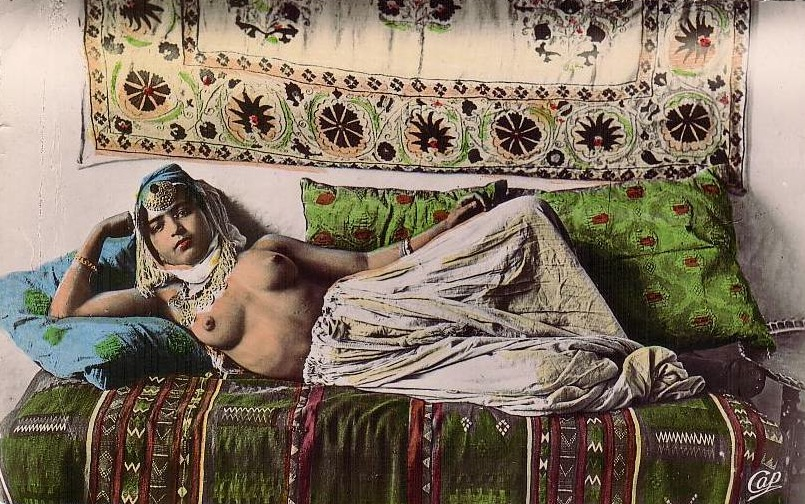 Compagnie des Arts Photomécaniques postcard